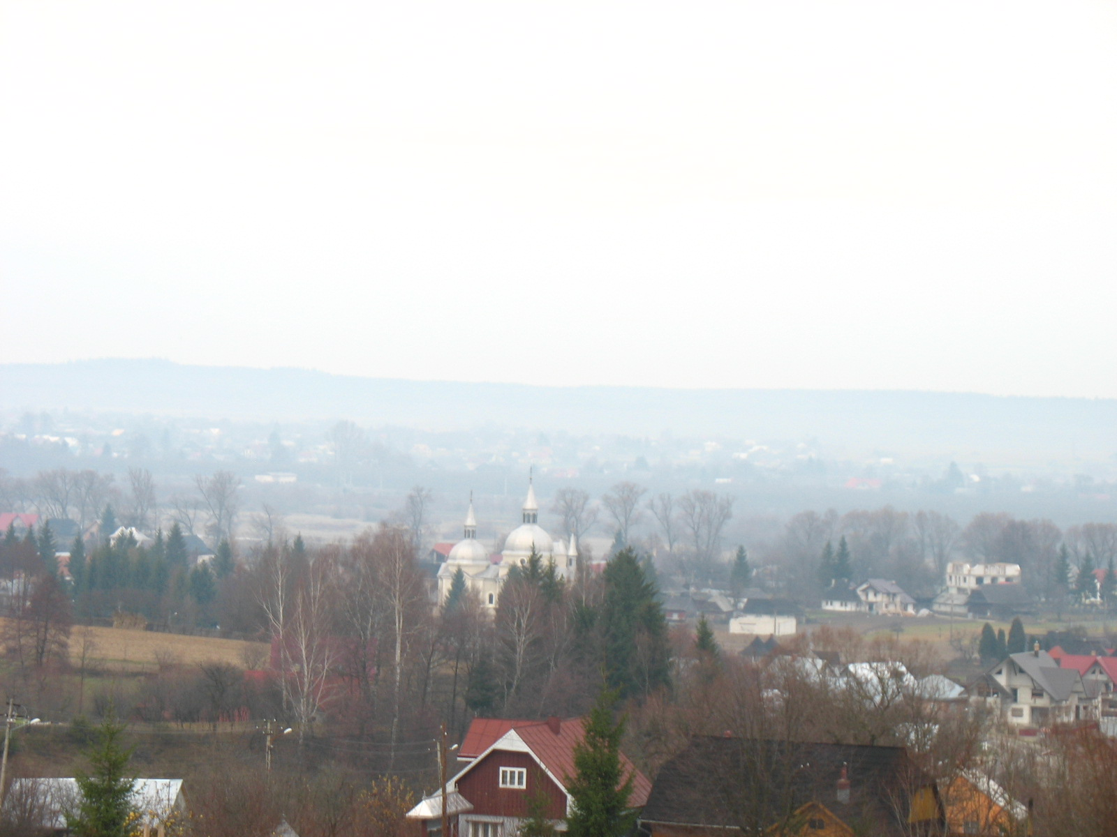 Vicovu de Jos